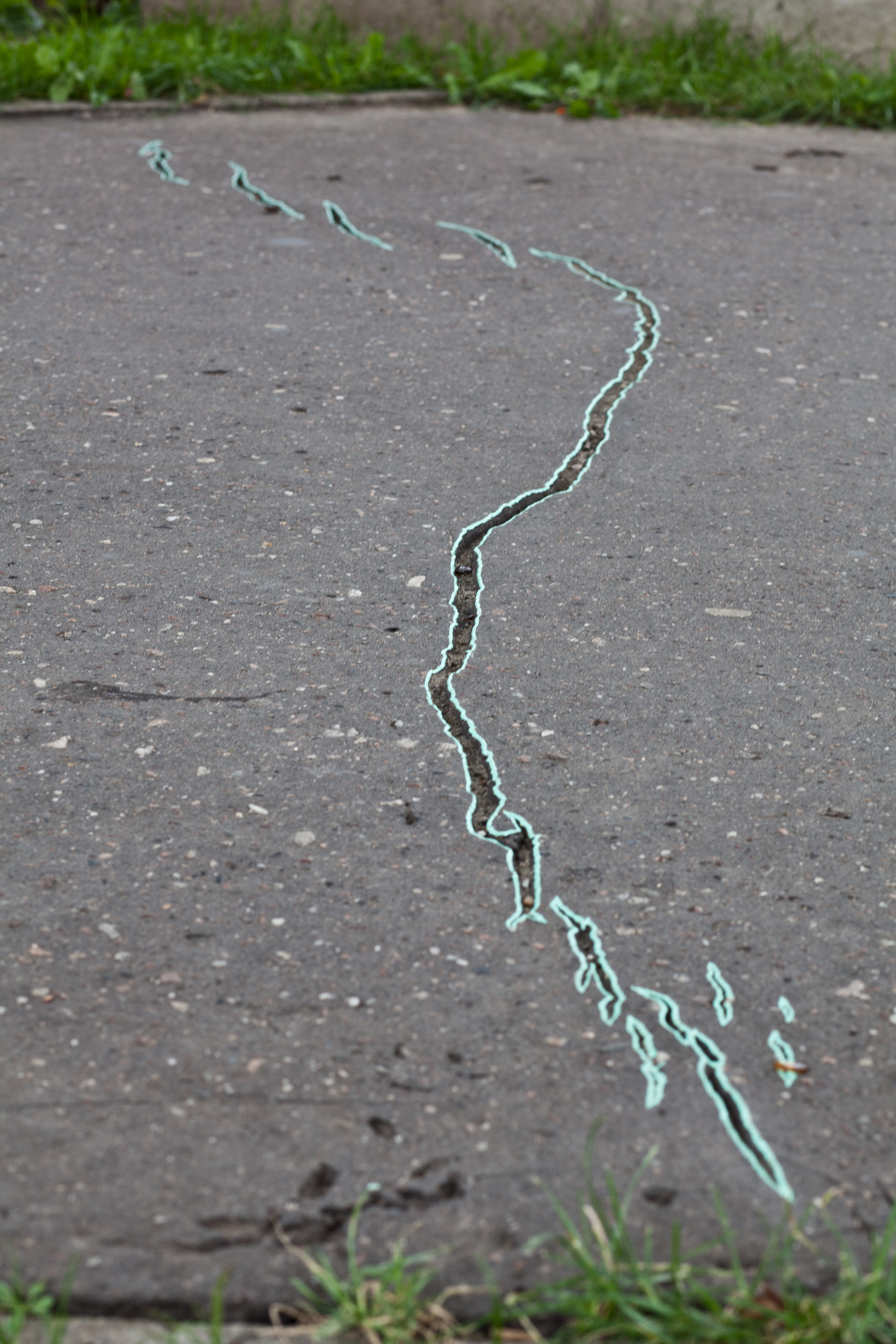 Latem 2010 roku Katarzyna Przezwańska wykonała kilkanaście interwencji malarskich w Parku Bródnowskim, korzystając z „naturalnych” fenomenów tego miejsca, zwracając uwagę na zużycie budowlanych materiałów, jak i wykorzystując znalezione obiekty o właściwościach rzeźbiarskich. Abstrakcyjne malarstwo Przezwańskiej pojawia się w relacji do pęknięć w chodnikach, ścieżek z betonowych płyt, ubytków w asfalcie oraz zastanej infrastruktury parkowej: donic, zbiorników wodnych, ławek. Powstające pod gołym niebem obrazy podkreślają egzotykę parku w centrum blokowiska. Kolory użyte przez artystkę zapożyczone są najczęściej z fasad okolicznych bloków mieszkalnych, pojawiają się też „obce” jaskrawe róże czy błękity.